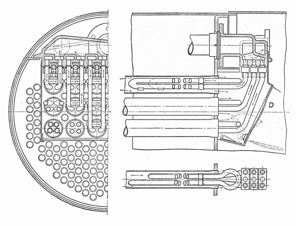 Schmidt superheater (Heat Engines, 1913).jpg